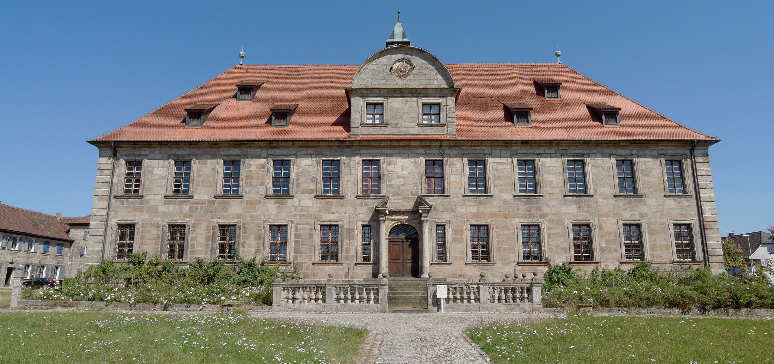 Schloss Hemhofen